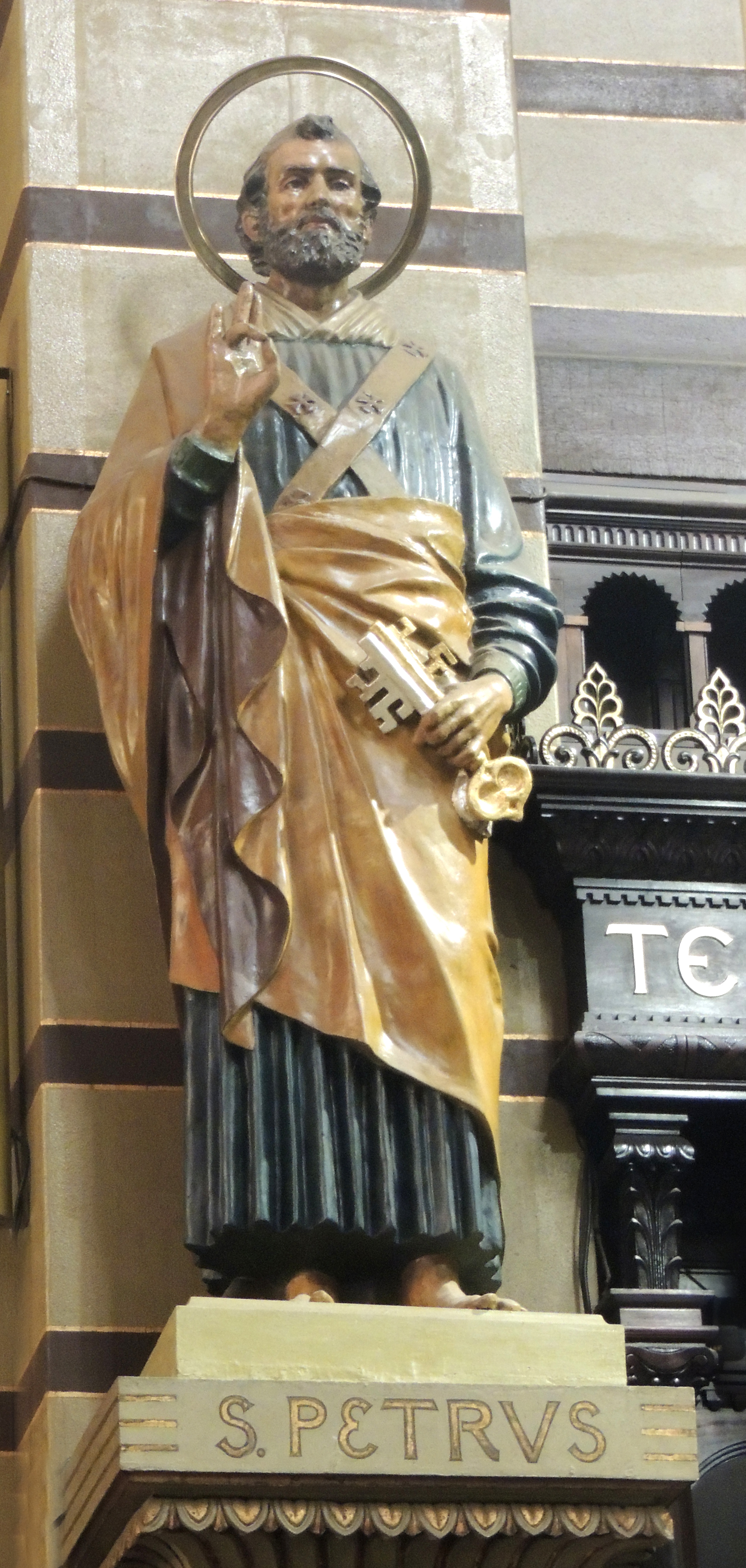 Integra um conjunto de estátuas da Basílica de Nossa Senhora da Assunção do Mosteiro de São Bento na cidade de São Paulo.Os apóstolos têm cerca de 2,80 m de altura, são feitos de gesso policromo e estão instalados na nave da igreja beneditina, a uma altura de aproximadamente 3,5 m. Moldadas por Van Emelen em seu ateliê no Palácio das Indústrias, São Paulo, entre 1920 e 1922, as estátuas teriam sido inauguradas no dia da consagração da basílica, em 1922.